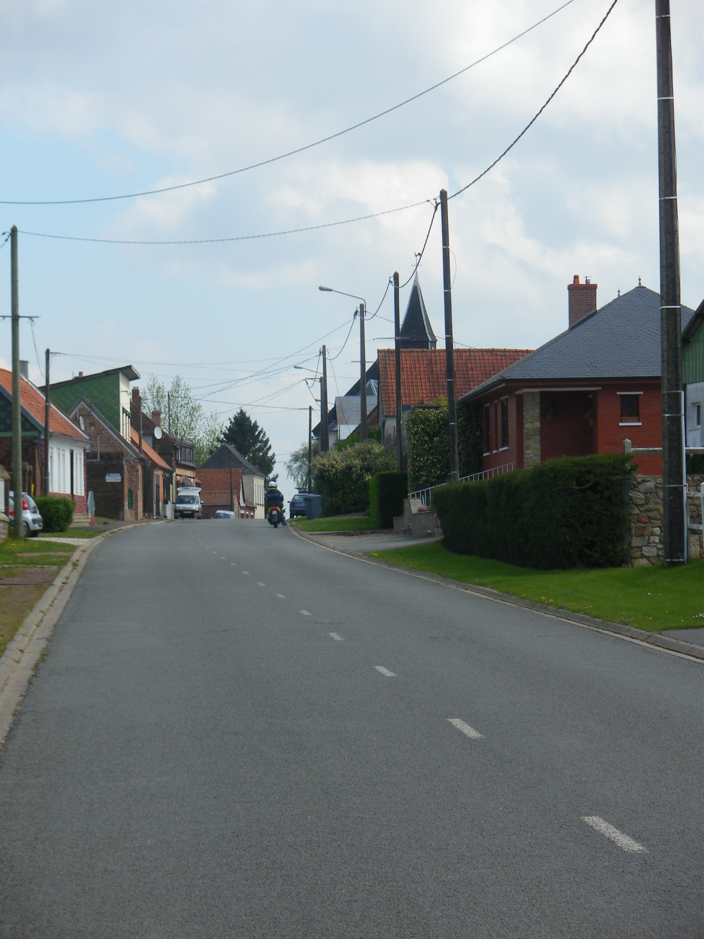 Vue de la rue principale de Beaufort-Blavincourt.